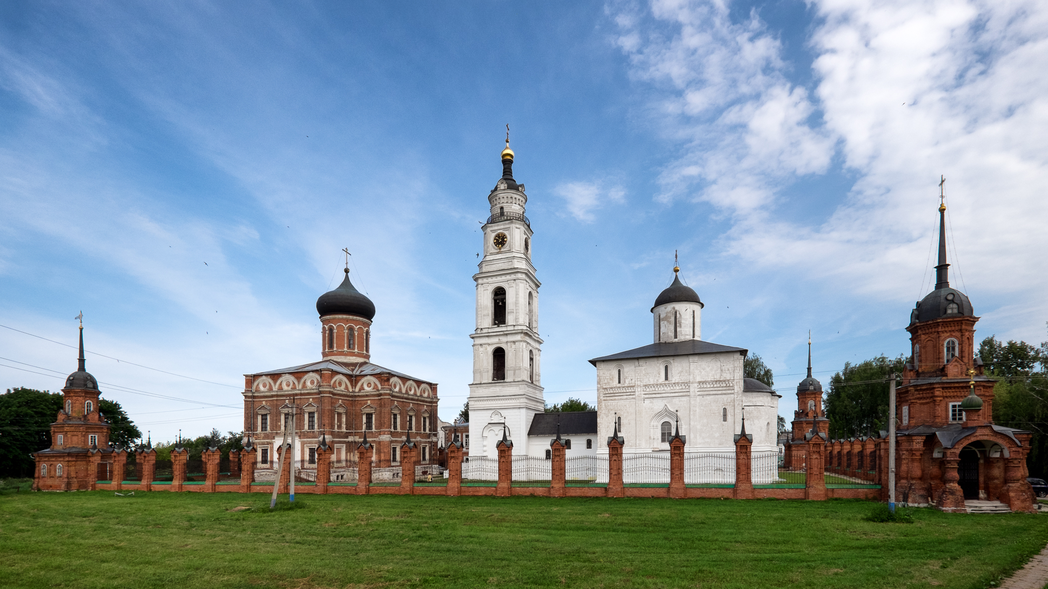 Волоколамский кремль. Снято с вала кремля 16.07.2016 г.